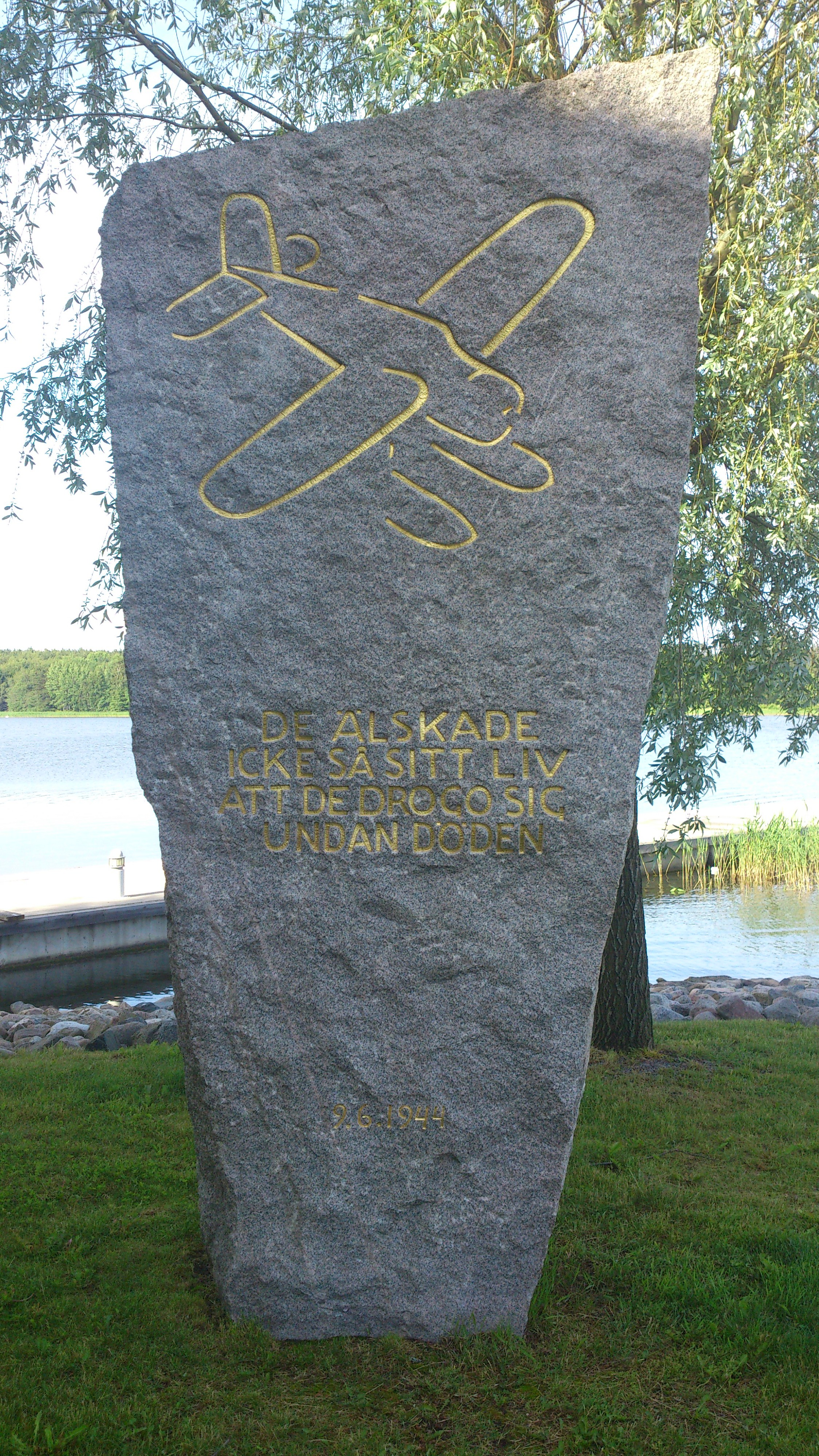 Minnessten vid f.d Roslagens flygflottilj eller även känt som F 2 Hägernäs. Denna minnessten hedrar dem, som under perioden 1919-1944 förolyckades under militär flygverksamhet vid F 2 Hägernäs. Inskriptionen på stenen lyder De älskade inte så sitt liv, att de drogo sig undan döden. Stenen restes och avtäcktes intill kanslihuset den 9 juni 1944, i närvaro av bland annat flottiljens personal och biskop Manfred Björkqvist. I maj 2005 flyttades stenen till dess nuvarande plats intill Häernäsviken.